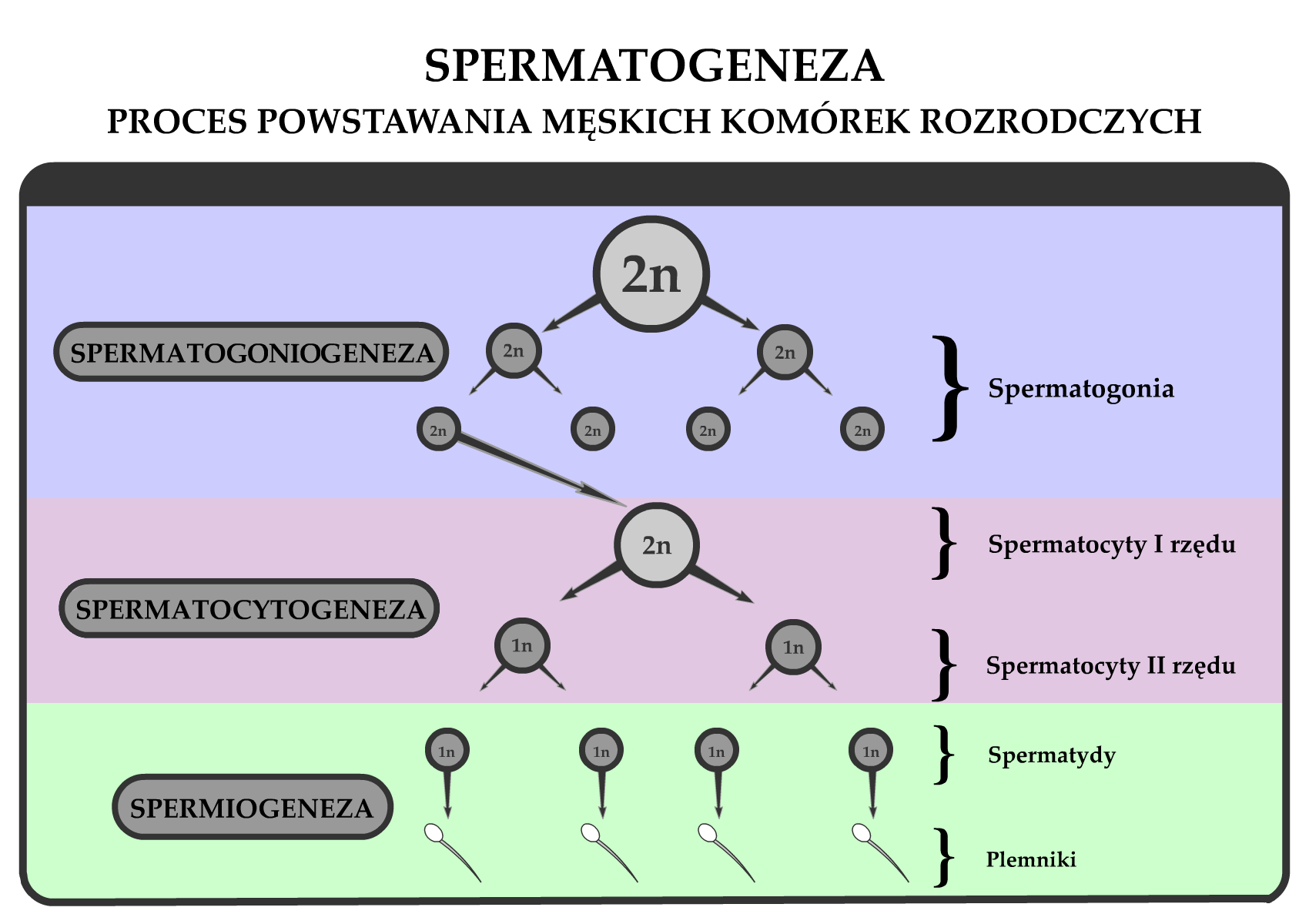 Spermatogeneza-schemat. *Autor: Mateusz Rutkowski *Źródło: własna praca *Data utworzenia: kwiecień 2007